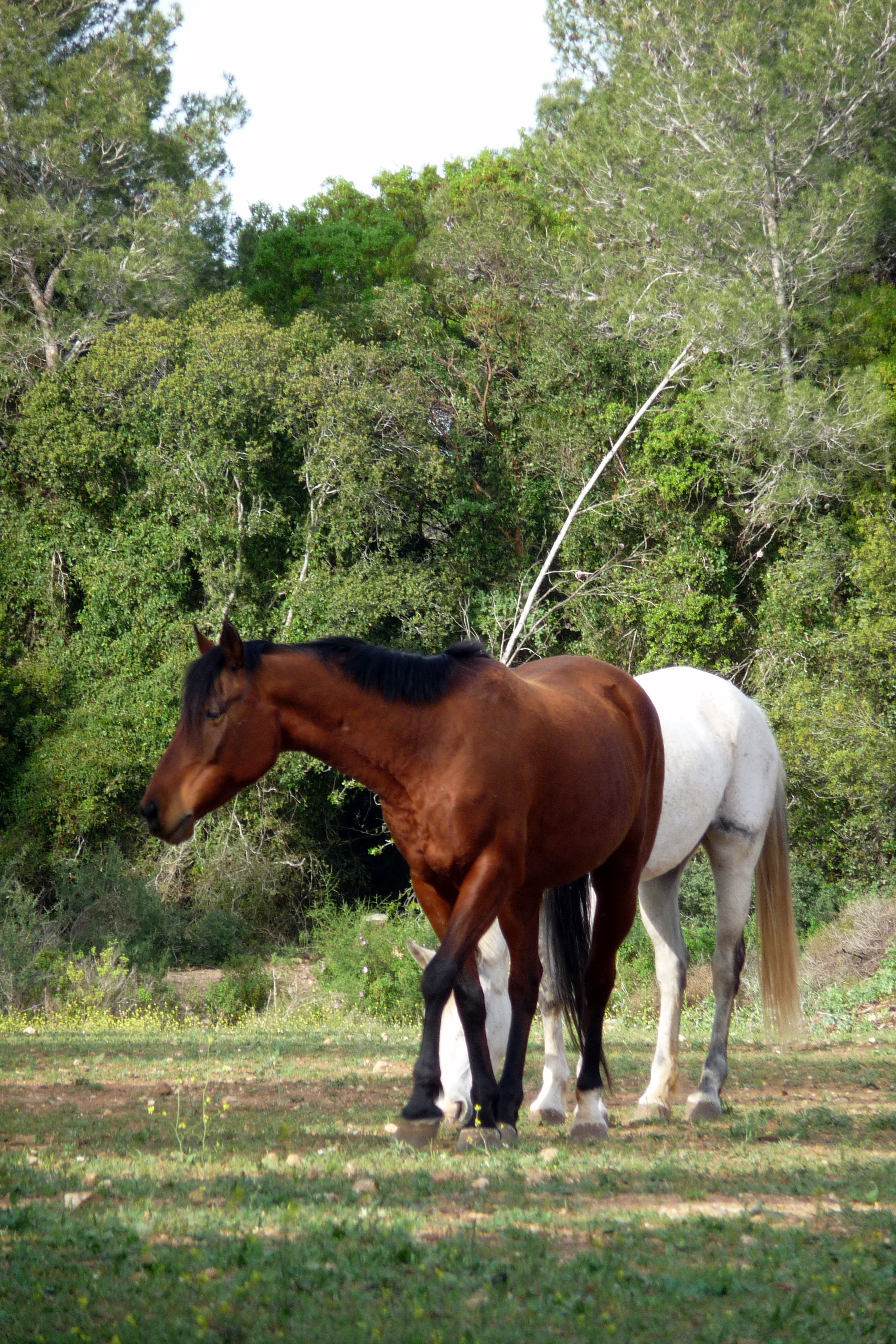 פארק הכרמל הוא כינוי לרצף של גנים לאומיים ושמורות טבע על הר הכרמל הגבוה, המשתרע מגבולותיהן הדרומיים של הערים חיפה ונשר בצפון, ועד אזור נחל מערות ועמק מהר"ל בדרום; שלושה יישובים על רכס הכרמל מהווים מובלעות בתוך רצף שטחי הפארק - עספיא, דלית אל כרמל ובית אורן. גודל הפארק המקורי היה 101,590 דונם, מתוכם 63,950 דונם שהוגדרו כ-"גן לאומי" ו-37,640 דונם הוגדרו כ"שמורת טבע". שטח השמורות משולב בתוך פארק הכרמל כאשר שטחי הגן הלאומי מקיפים את השמורות ויוצרים רצף של שטחים ירוקים.